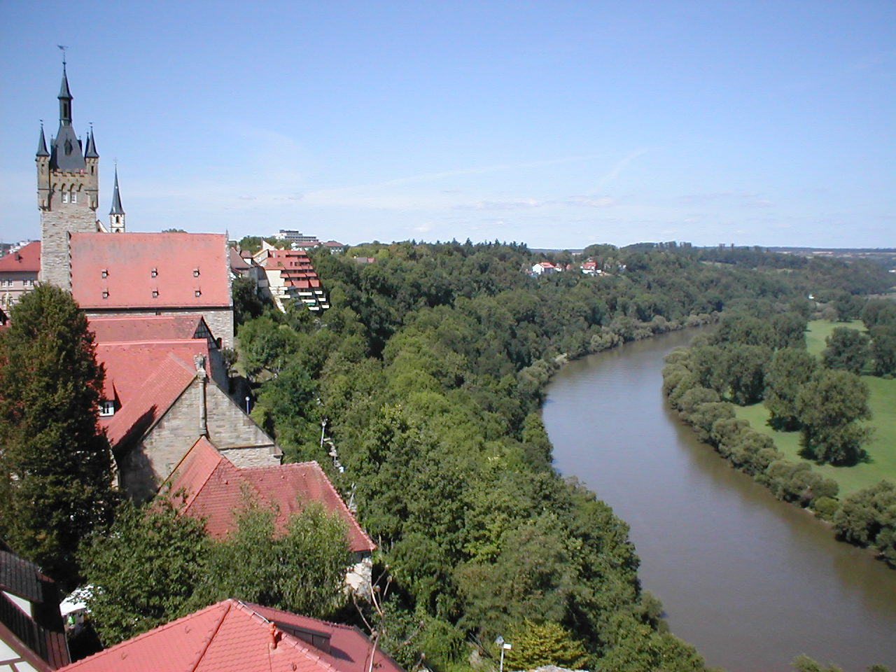 Bad Wimpfen, Blick vom Roten Turm über Kaiserpfalz und Neckarbogen Richtung Heinsheim